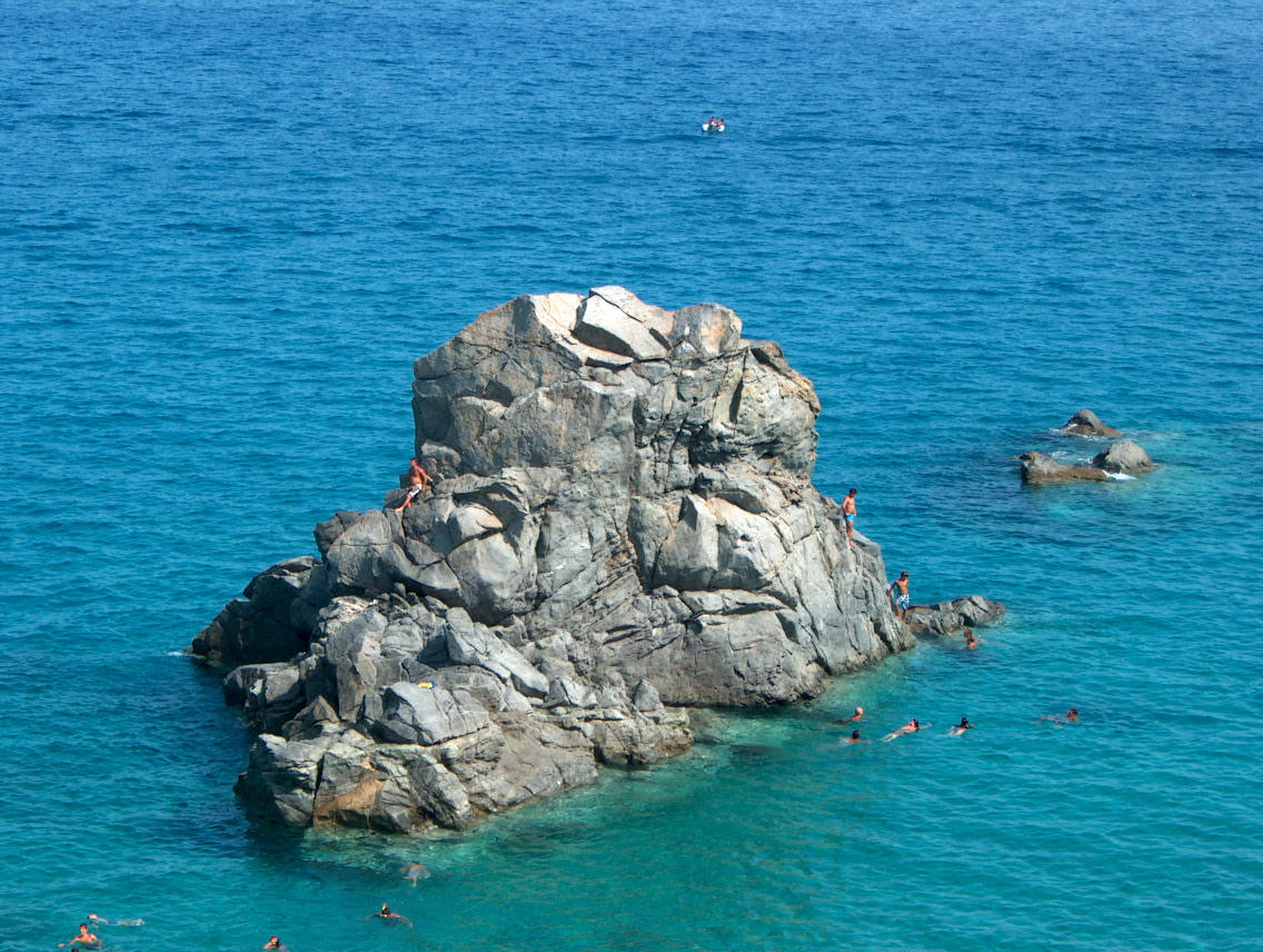 Scoglio di Pietragrande. Mare Jonio. Provincia di Catanzaro.